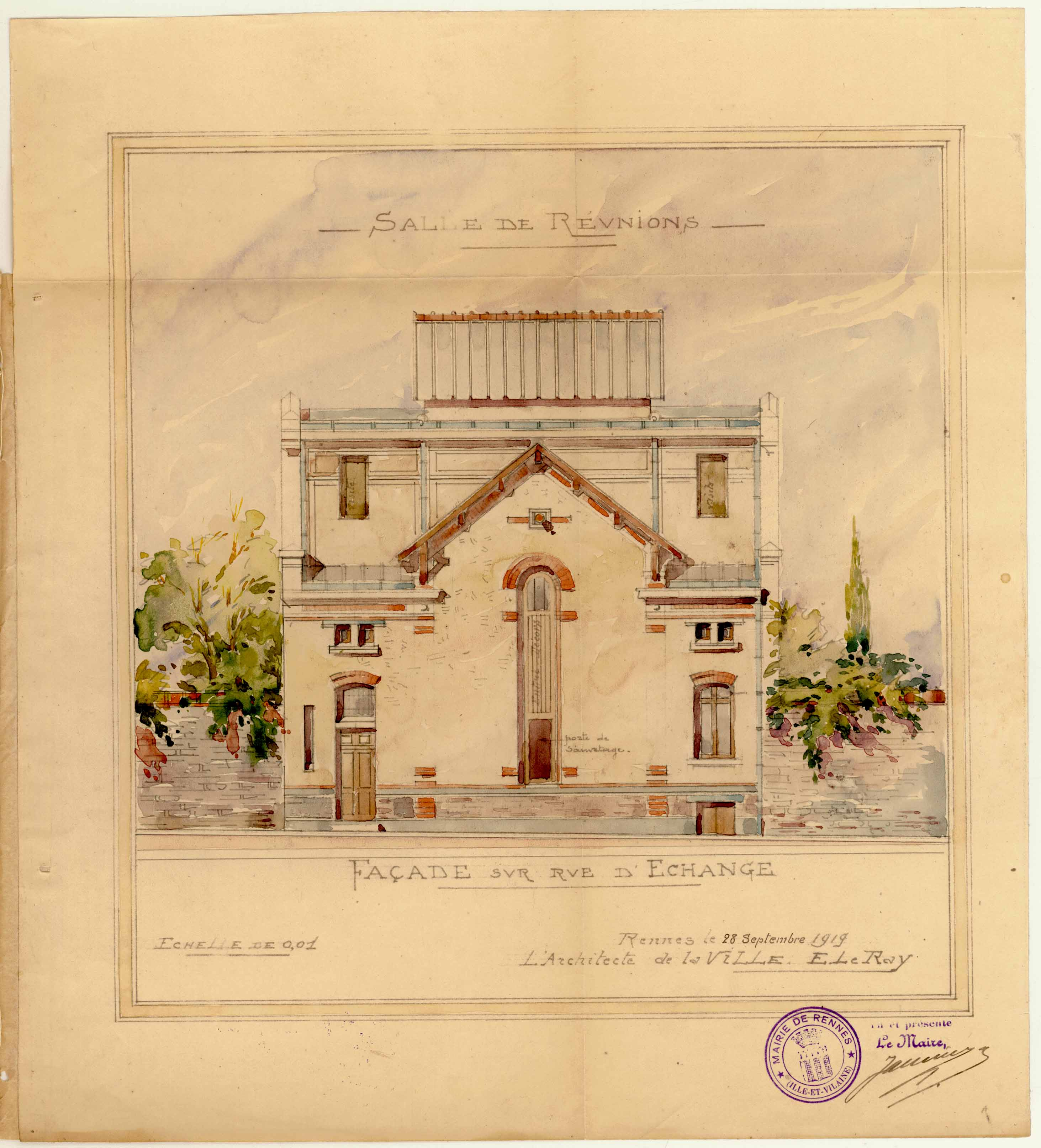 Projet de construction d'une salle de réunion : plan en élévation de la façade sur la rue d'Echange. Archives municipales de Rennes, 2 Fi 4970.